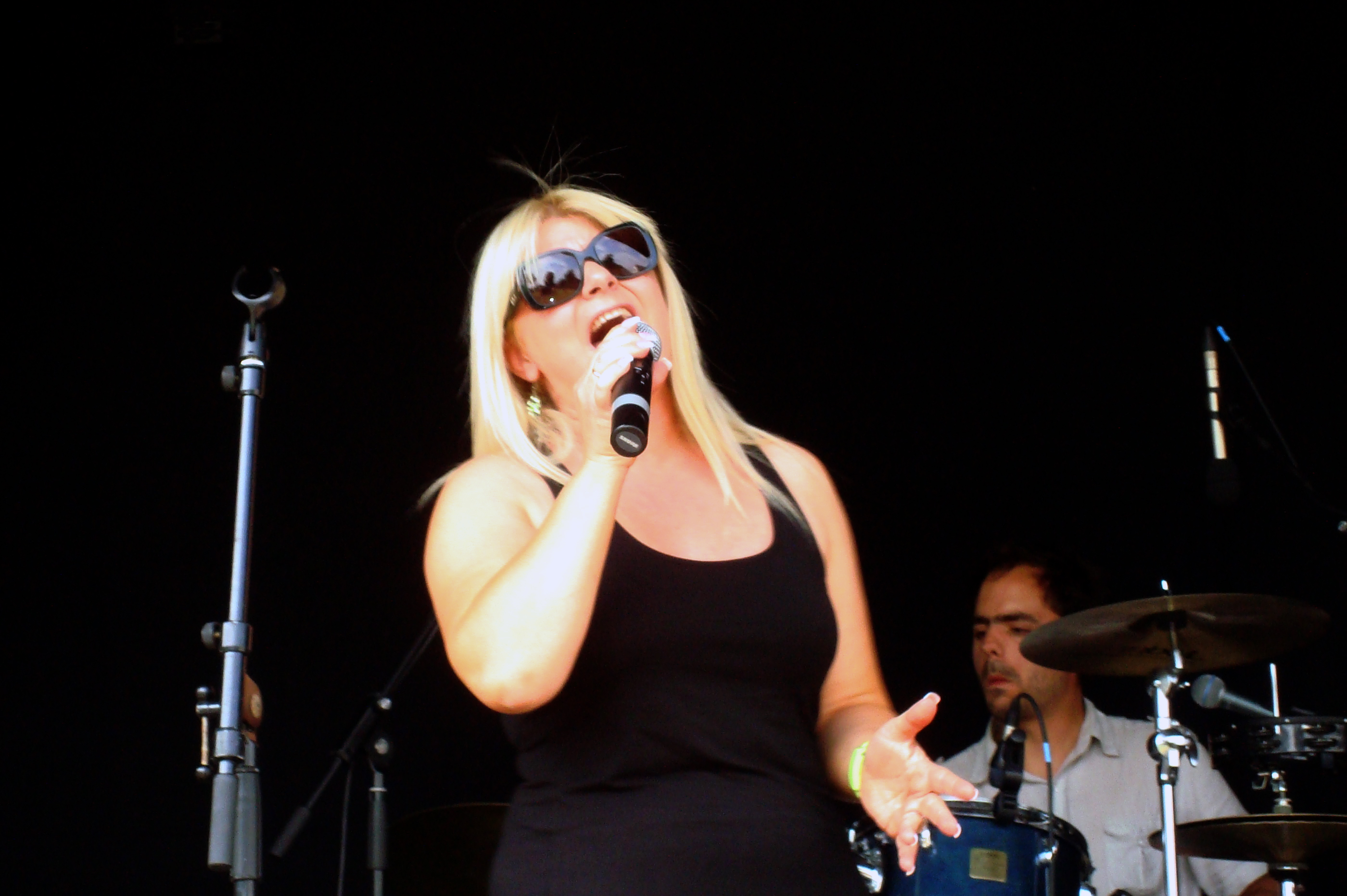 balance d'avant concert, photo prise par Michaël Bemelmans.